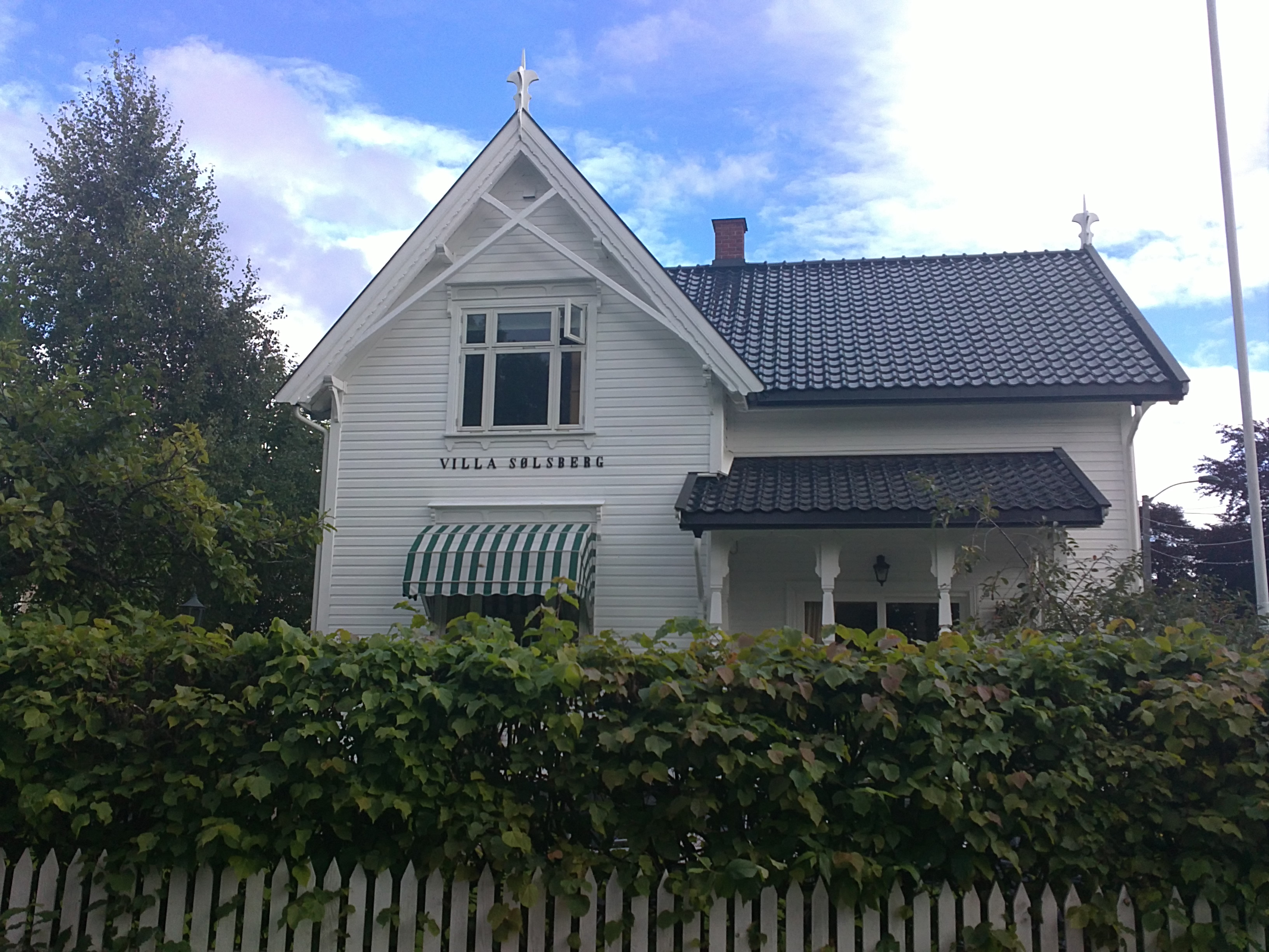 bilde av Villa Sølsberg, Nanset